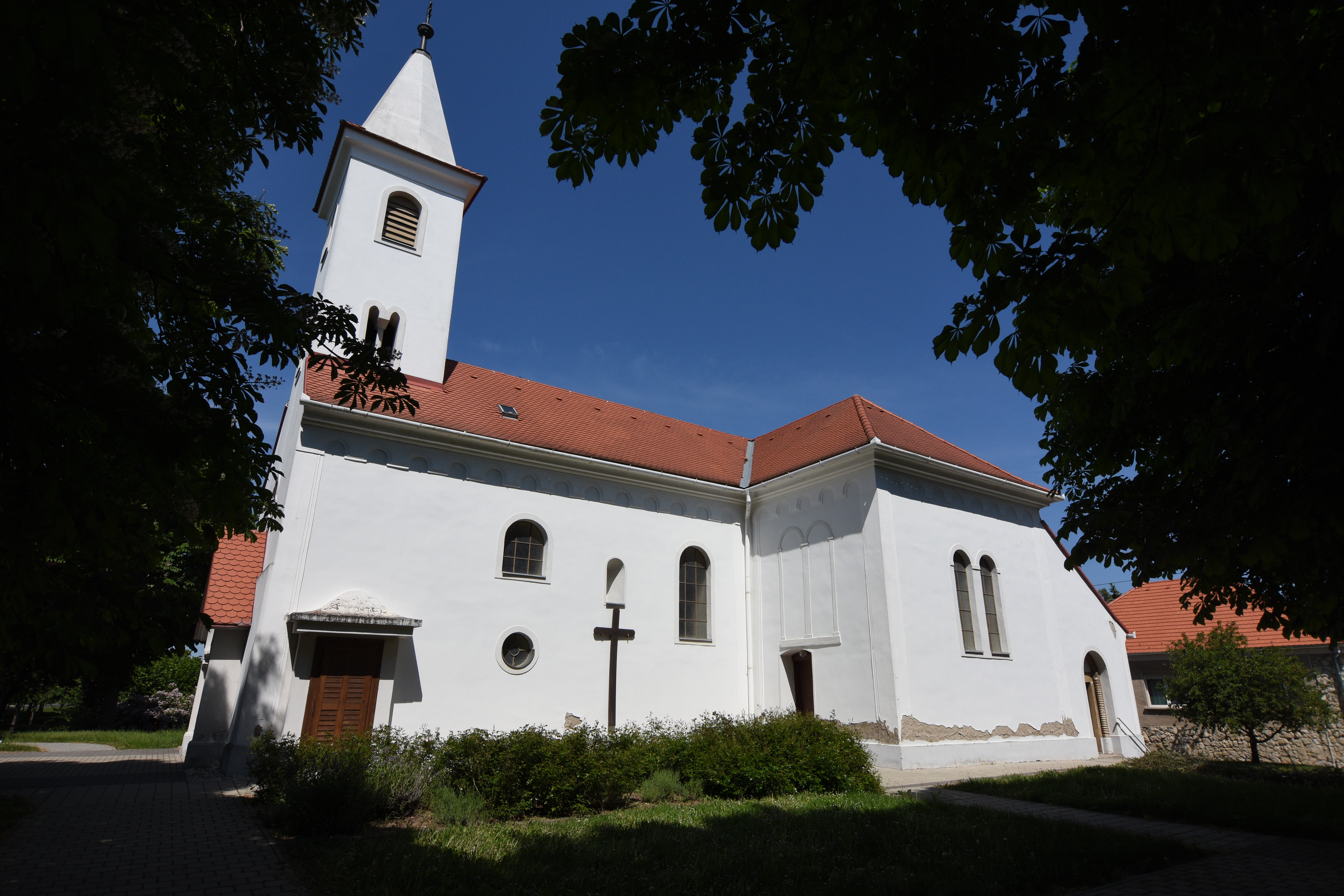 Saint Mark Church, Rábasömjén